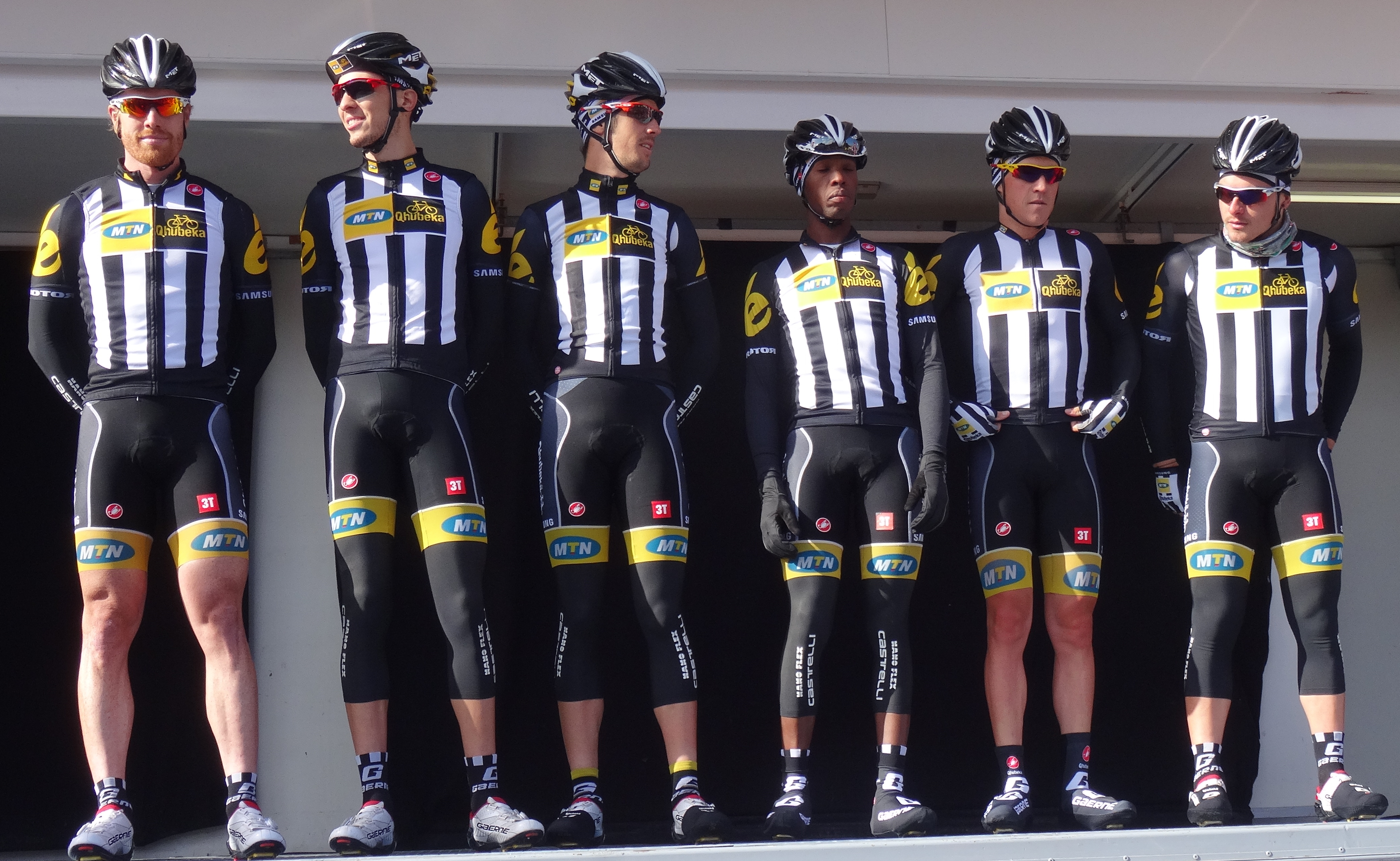 Reportage réalisé le mercredi 4 mars à l'occasion du départ du Samyn des Dames 2015 et du Samyn 2015 à Quaregnon, Belgique.